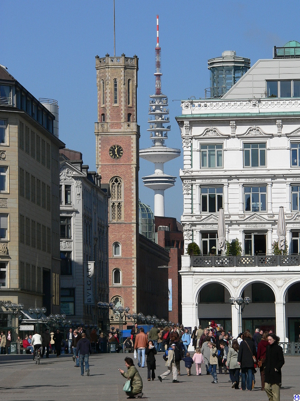 Alte Post in der Hamburger Neustadt, Poststraße mit Telemichel im Hintergrund und Alsterarkaden im Vordergrund. Das Gebäude wurde 1845 bis 1847 nach Plänen von Alexis de Chateauneuf erbaut.This is a photograph of an architectural monument.